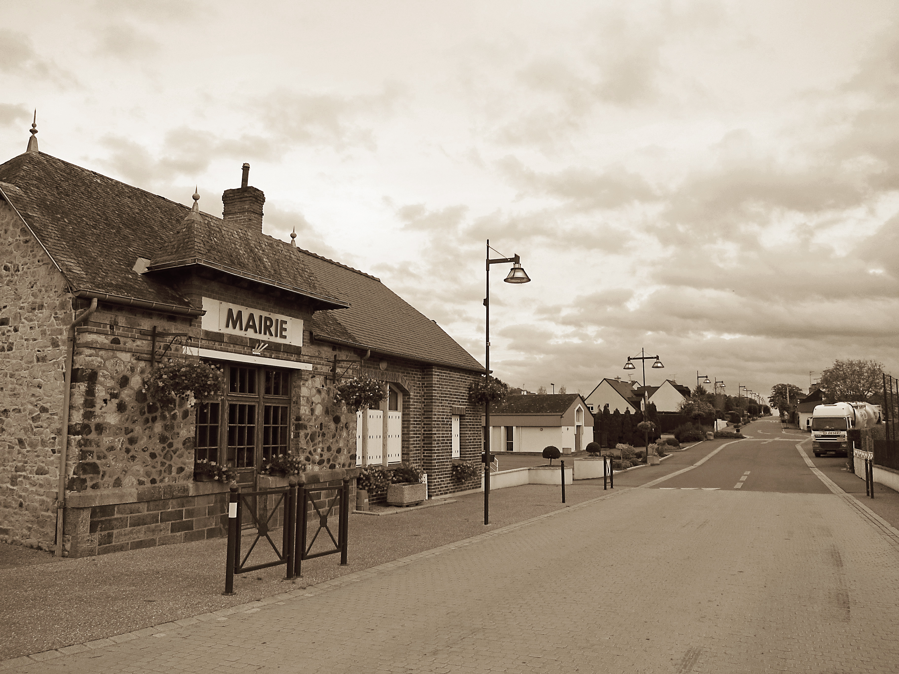 Mondevert (Ille-et-Vilaine, Bretagne, France) : La rue de la Forêt et la mairie.